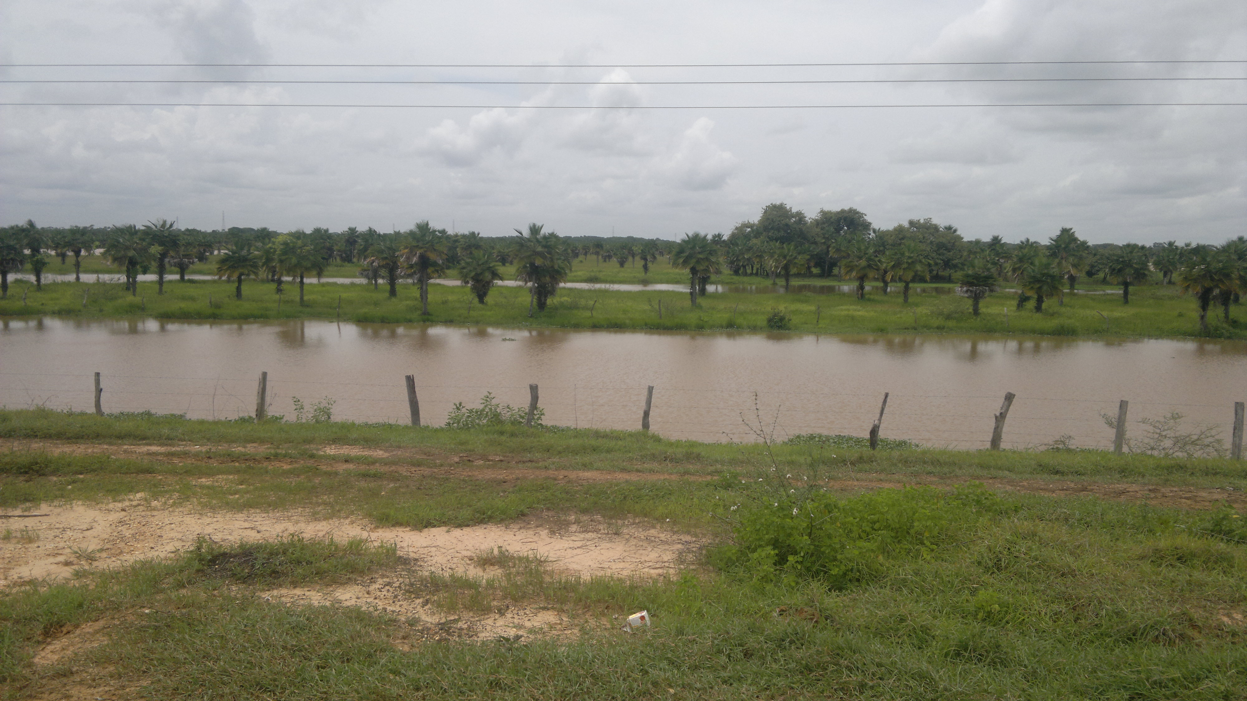 Vista de Los Esteros de Camaguán, Edo. Guárico, a escasos 40 kilómetros del Estado Apure. Este sitio es una conjunto de ciénagas que mantienen por muchos meses a los morichales (árboles) bajo el agua. El agua proviene de los ríos Apure y Barinas.